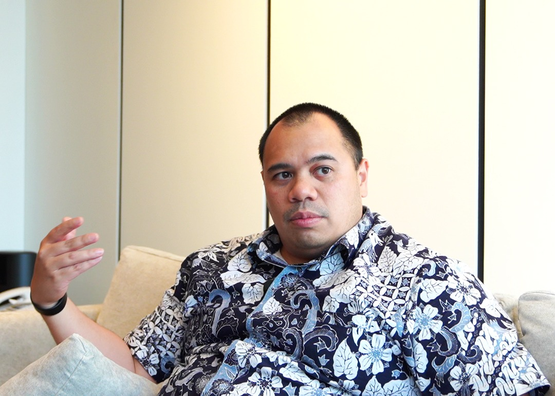 Foto Pandu Patria Sjahrir diambil pada 12 Februari 2020 di kantornya yang terletak di daerah SCBD, Jakarta Selatan.